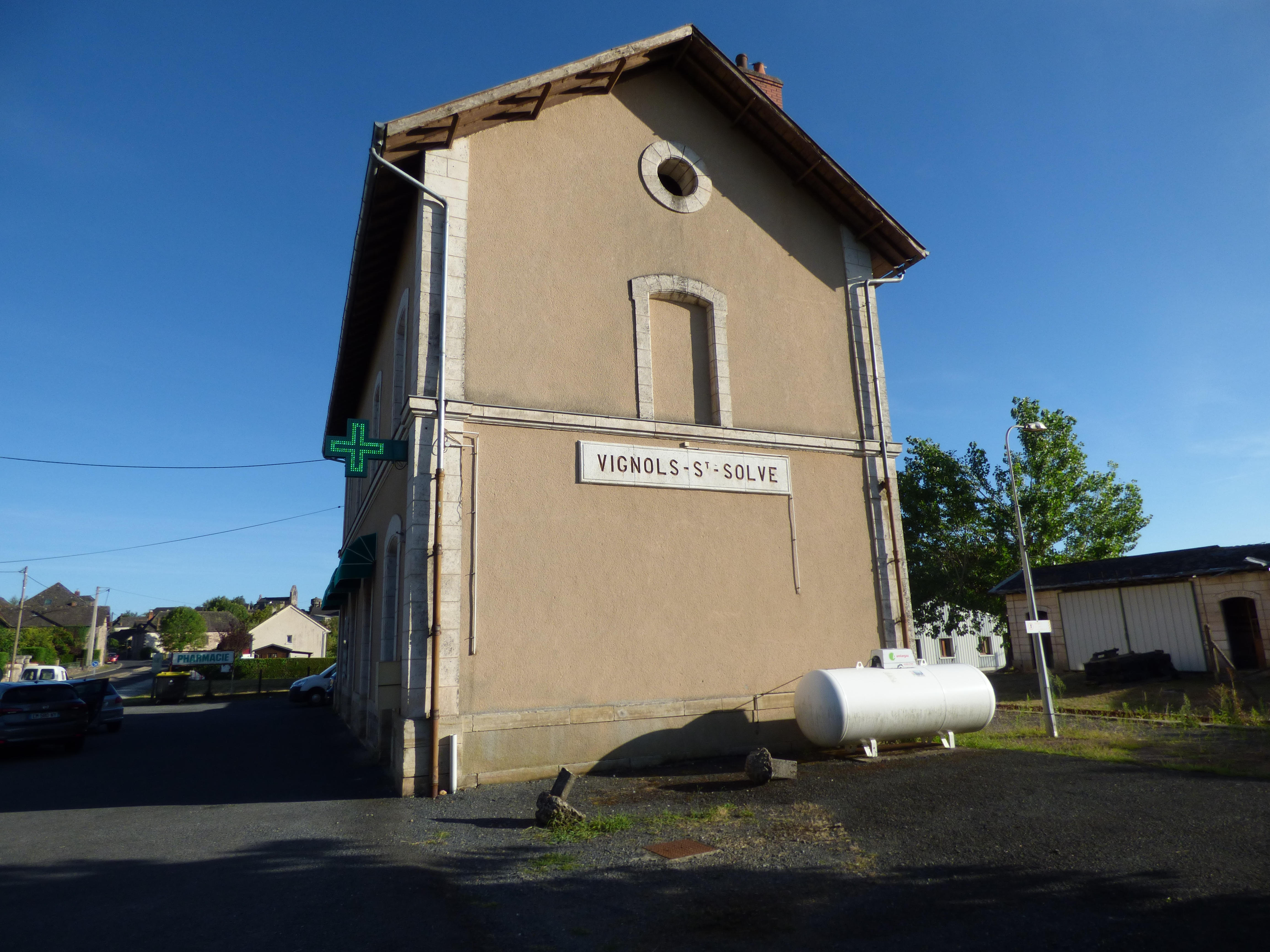 Gare du BV